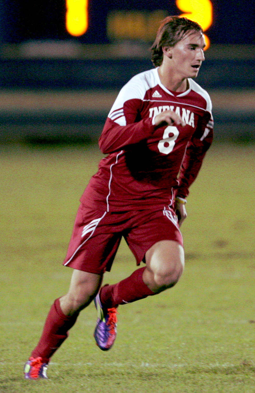 Michigan vs. Indiana